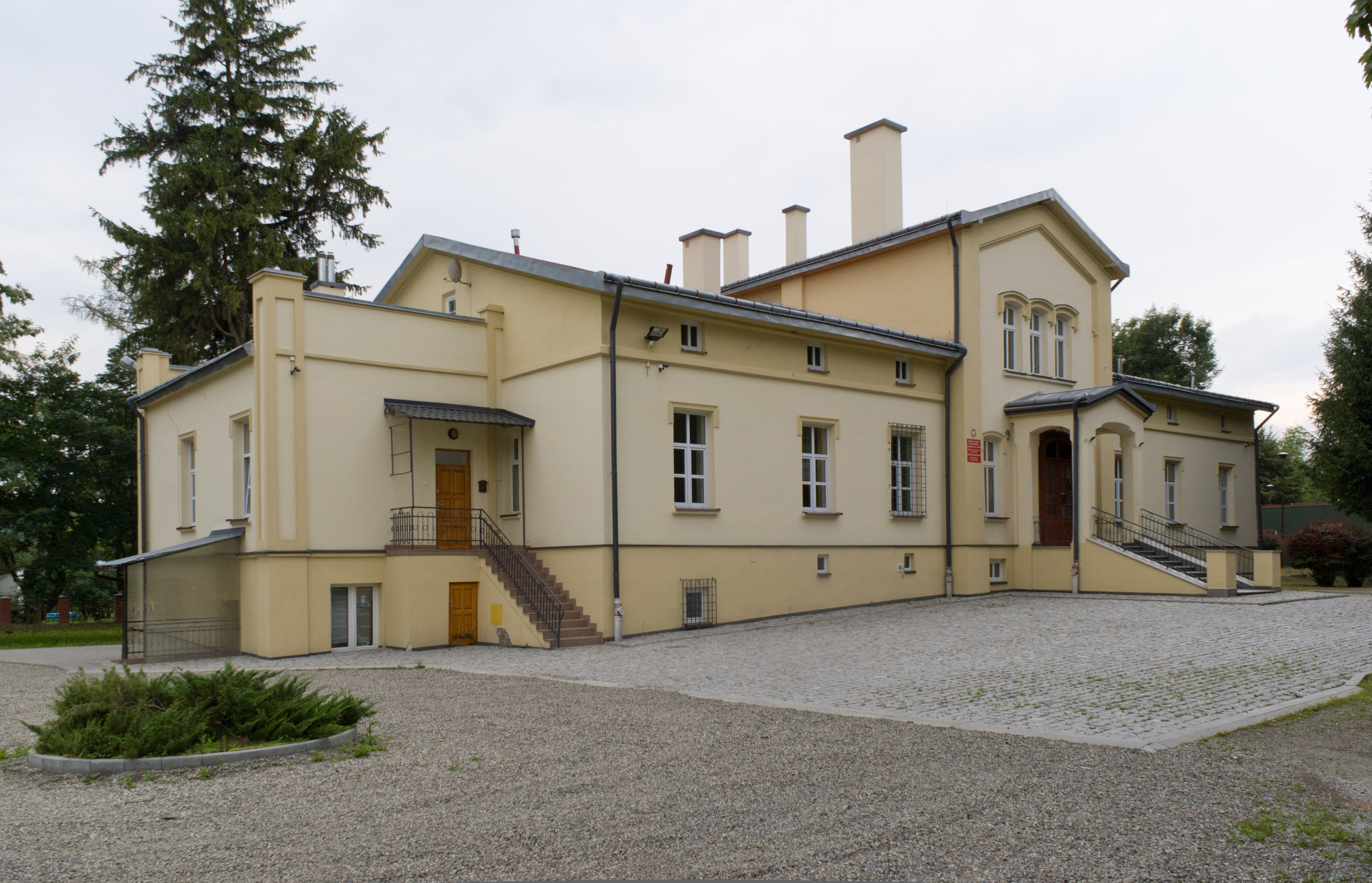 Dawny dwór w Ostrowie (powiat przemyski), obecnie Zespół Szkół 02.1986.